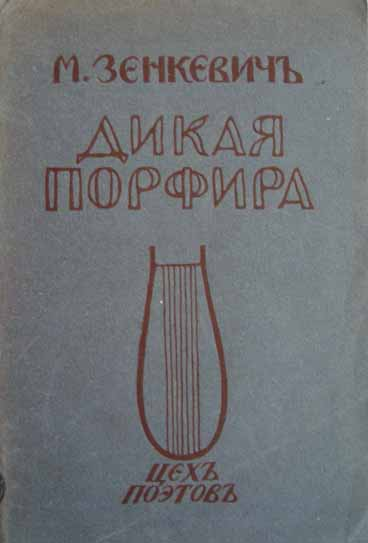 Couverture du recueil Le porphyre pourpre de M. Zenkevitch